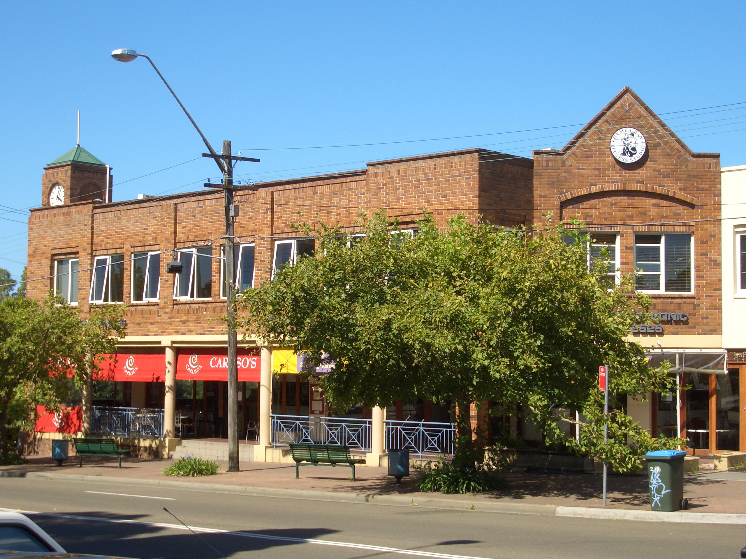 Gymea